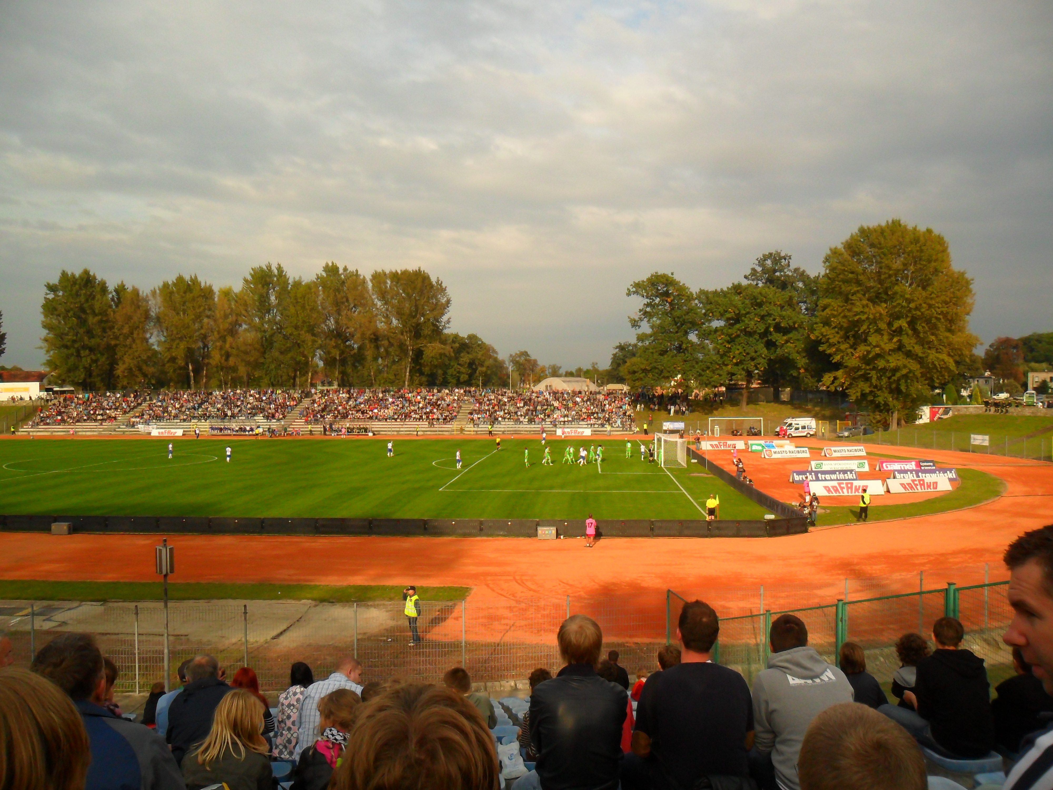 Pierwszy mecz 1/16 finału Ligi Mistrzów UEFA kobiet w sezonie 2012/2013 rozegrany 27 września 2012 roku na stadionie OSiR-u w Raciborzu pomiędzy RTP Unią Racibórz, a niemieckim VfL Wolfsburg, przegrany przez Unię 1:5. Spotkaniem tym ustanowiono nowy rekord frekwencji na meczu piłki nożnej kobiet w Polsce (5125 widzów).